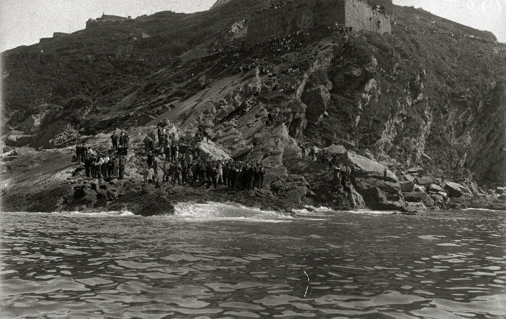 Título original: Regatas de traineras. Bandera de la Concha (1/18) Localización: San Sebastián (Guipúzcoa)